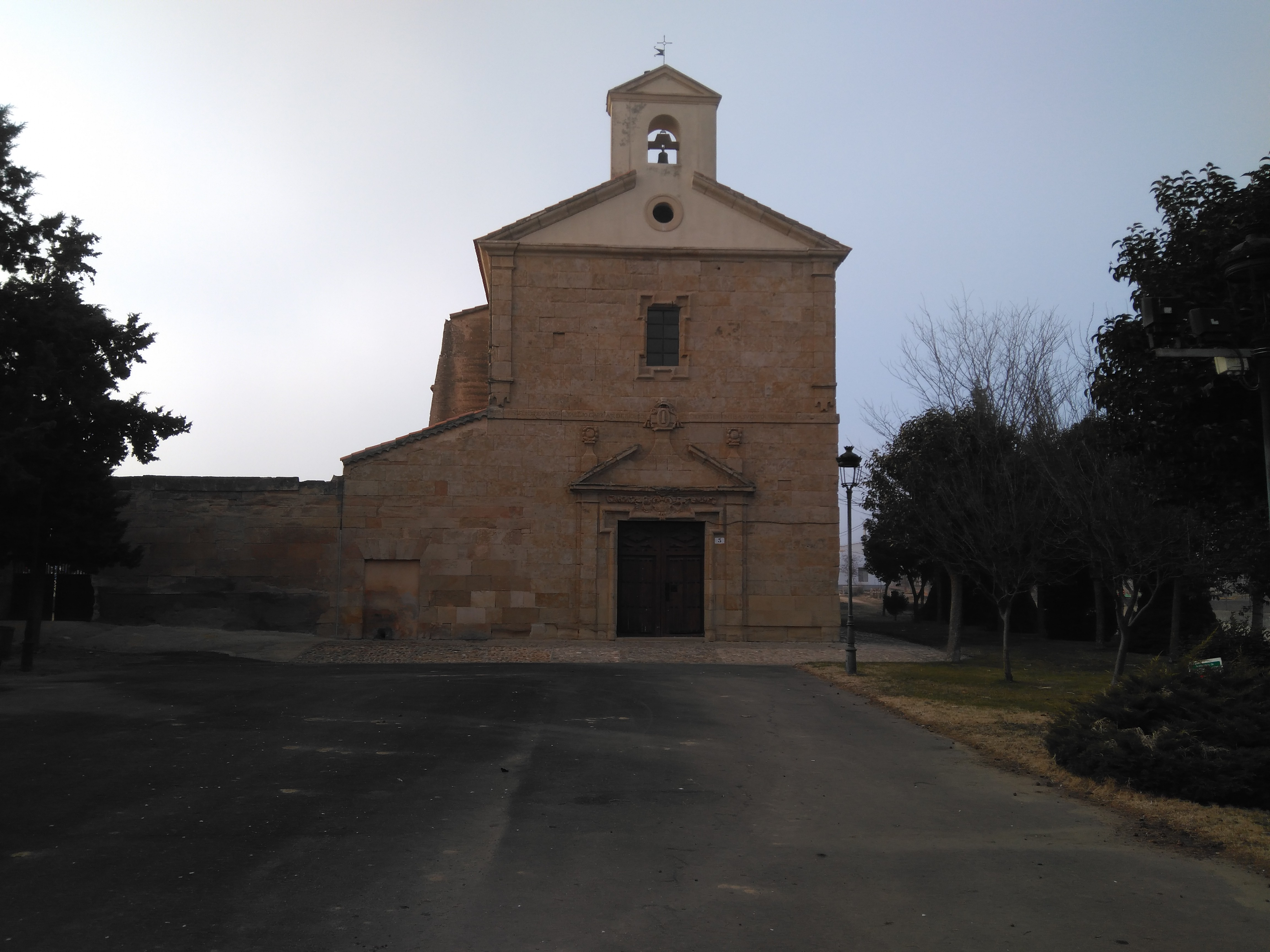 Ermita del Santo Cristo de Hornillos en Arabayona de Mógica. Esta ermita se construyó para conmemorar un milagro sucedido en el siglo XVII. En su interior contiene una talla custodiada por los padres basilios hasta el siglo XIX. La ermita sigue atrayendo una romería hasta la actualidad, en el último fin de semana de octubre.